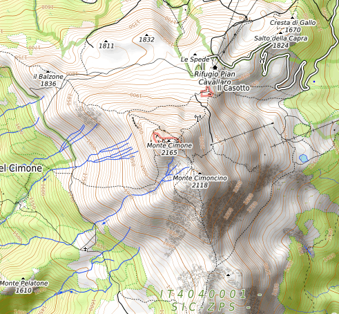 carte réalisée sur umap This map may be incomplete, and may contain errors. Don't rely solely on it for navigation.